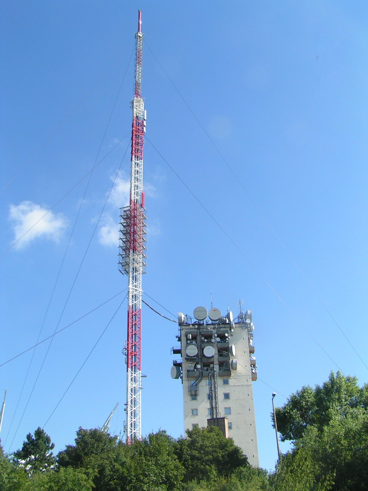 Adótorony